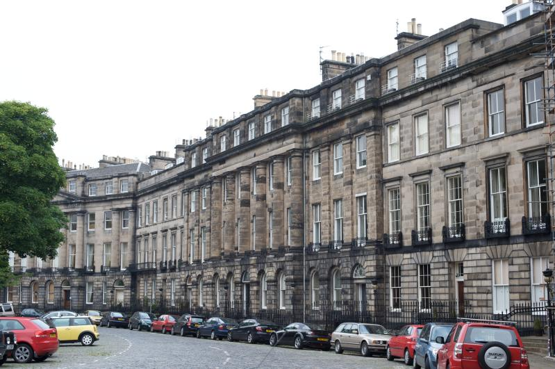 Moray Place